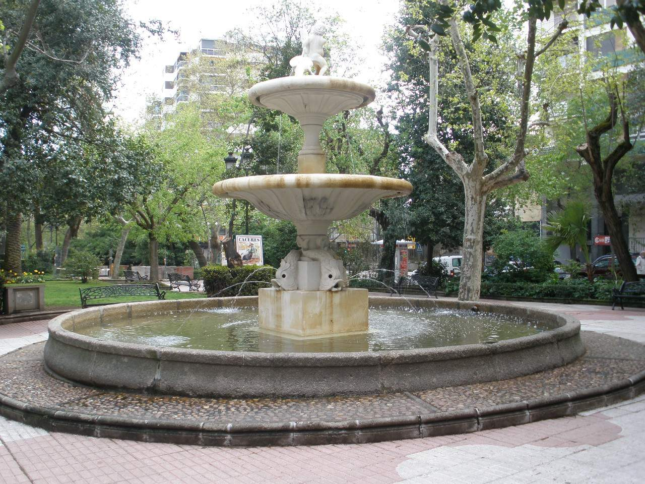 Cáceres - Paseo de Cánovas